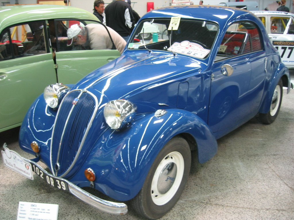 Simca 8